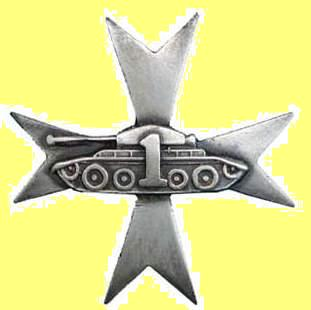 Replika odznaki 1 pułku pancernego PSZ na Zachodzie, zatwierdzona Dz. Rozk. Naczelnego Wodza i MON nr 4/45 o wymiarach 41 x 41 mm. Wykonana z białego metalu ze śrubką i nakrętką.